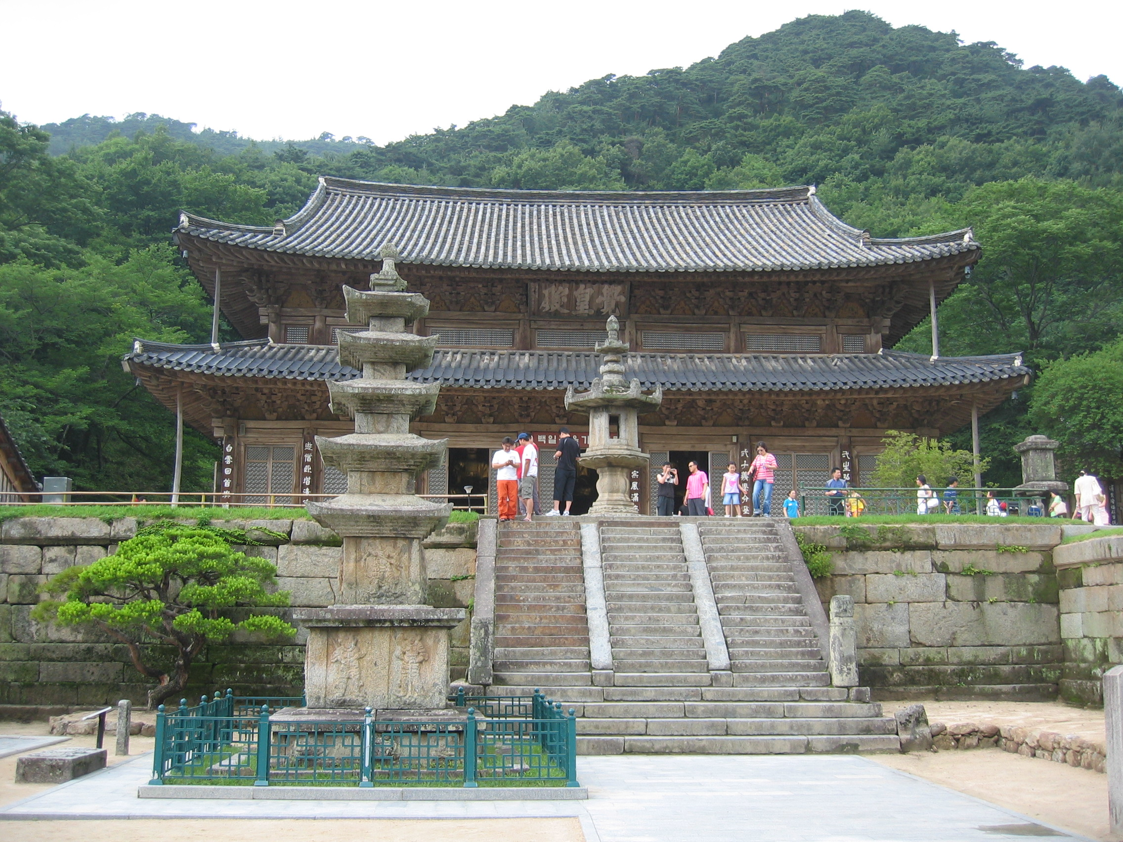 2006년 대한민국 지리산에 위치한 화엄사 Hwaeomsa, one of the Buddhist temples in Jirisan (Mt.Jiri), South Korea, 2006